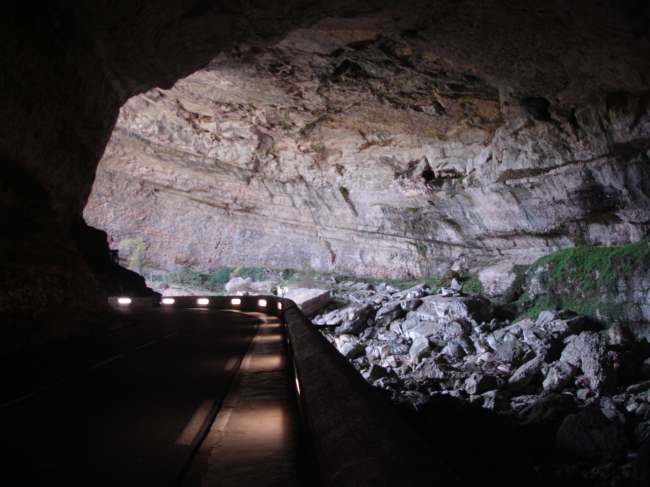 Grotte du Mas d'Azil, Ariège, Midi-Pyrénées), France.